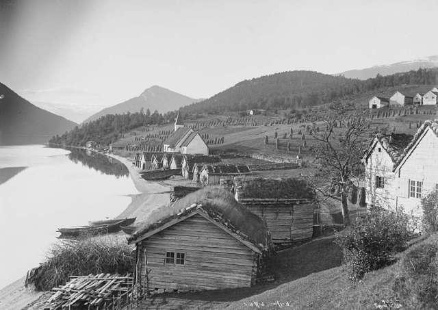 Gamle Breim kyrkje som var frå mellomalderen og vart riven då det vart bygd ny kyrkje (1886). Kyrkja stod på garden Hetle i Re i Gloppen.